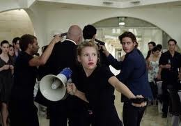 סצינה מתוך הסרט השוטר